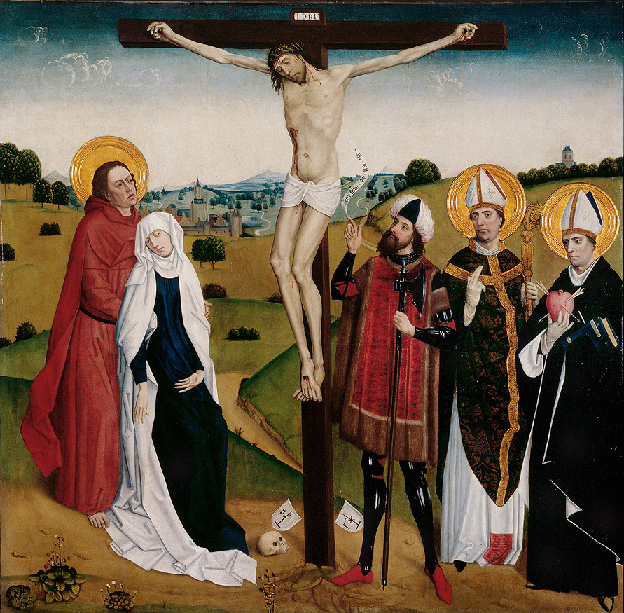 Meister Georgslegende Crucifixion avec saints